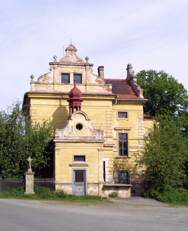 Škola a kaple z roku 1902, po levé straně starší křížek z roku 1882. Hedčany.